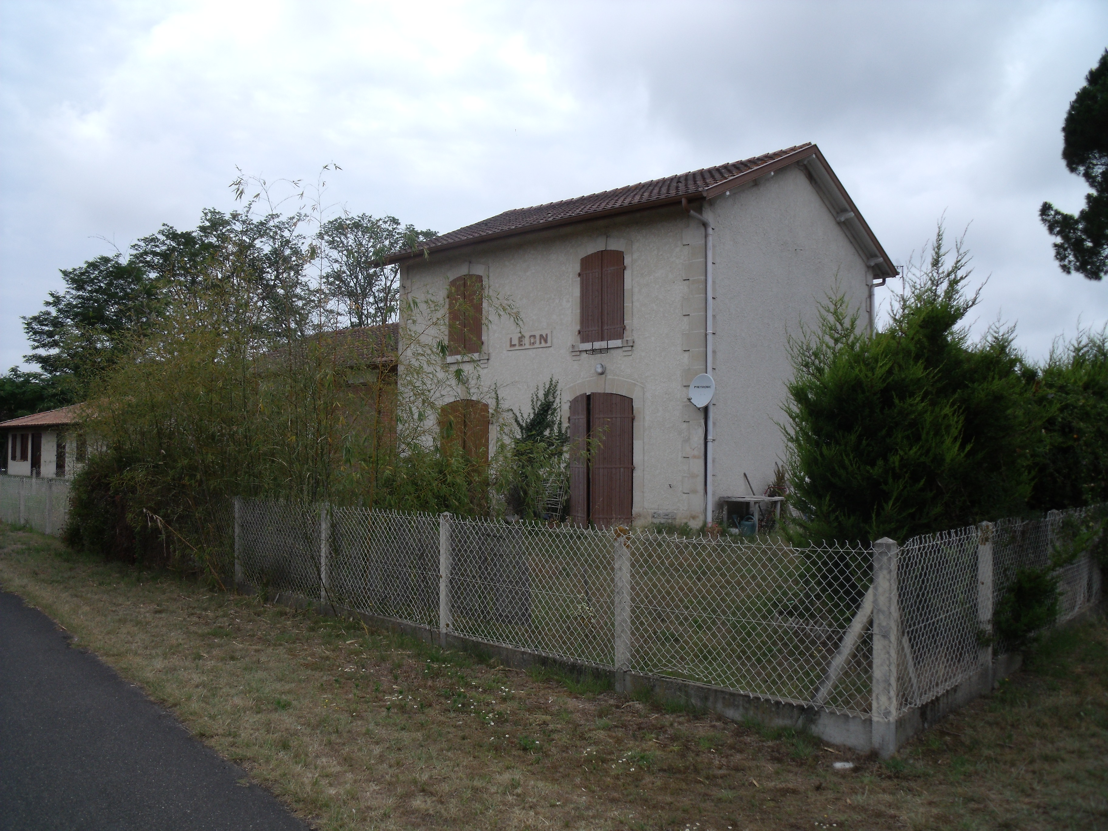 La gare désaffectée de Léon, Landes.